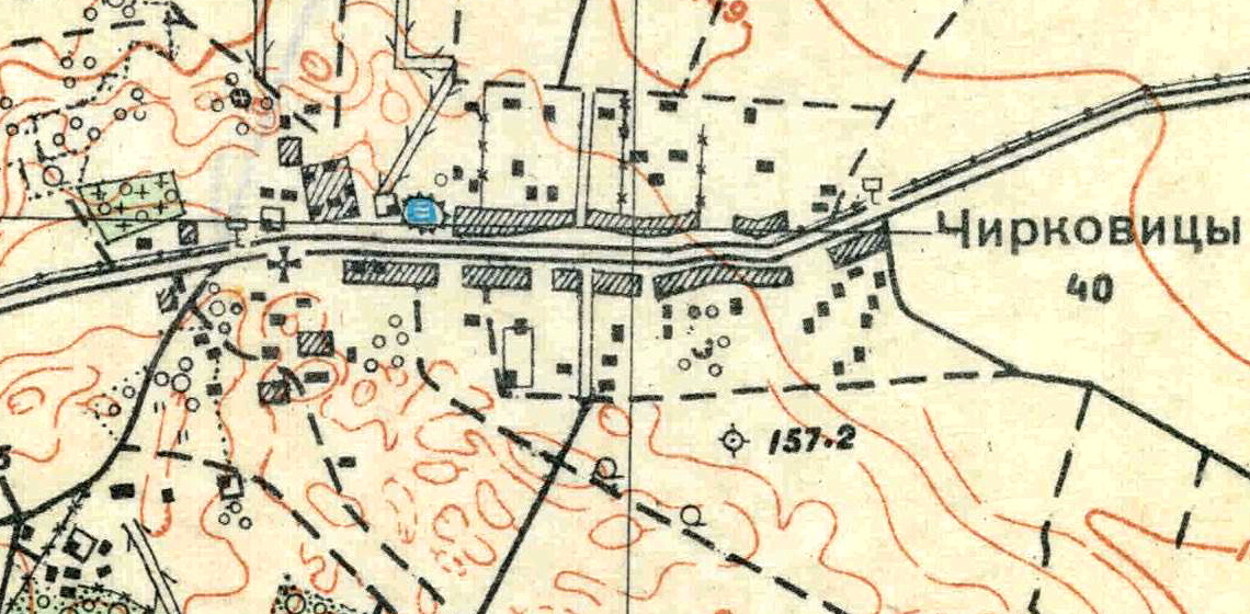 Топографическая карта Ленинградской области, квадрат О-35-23-А-г (Черенковицы), деревня Чирковицы